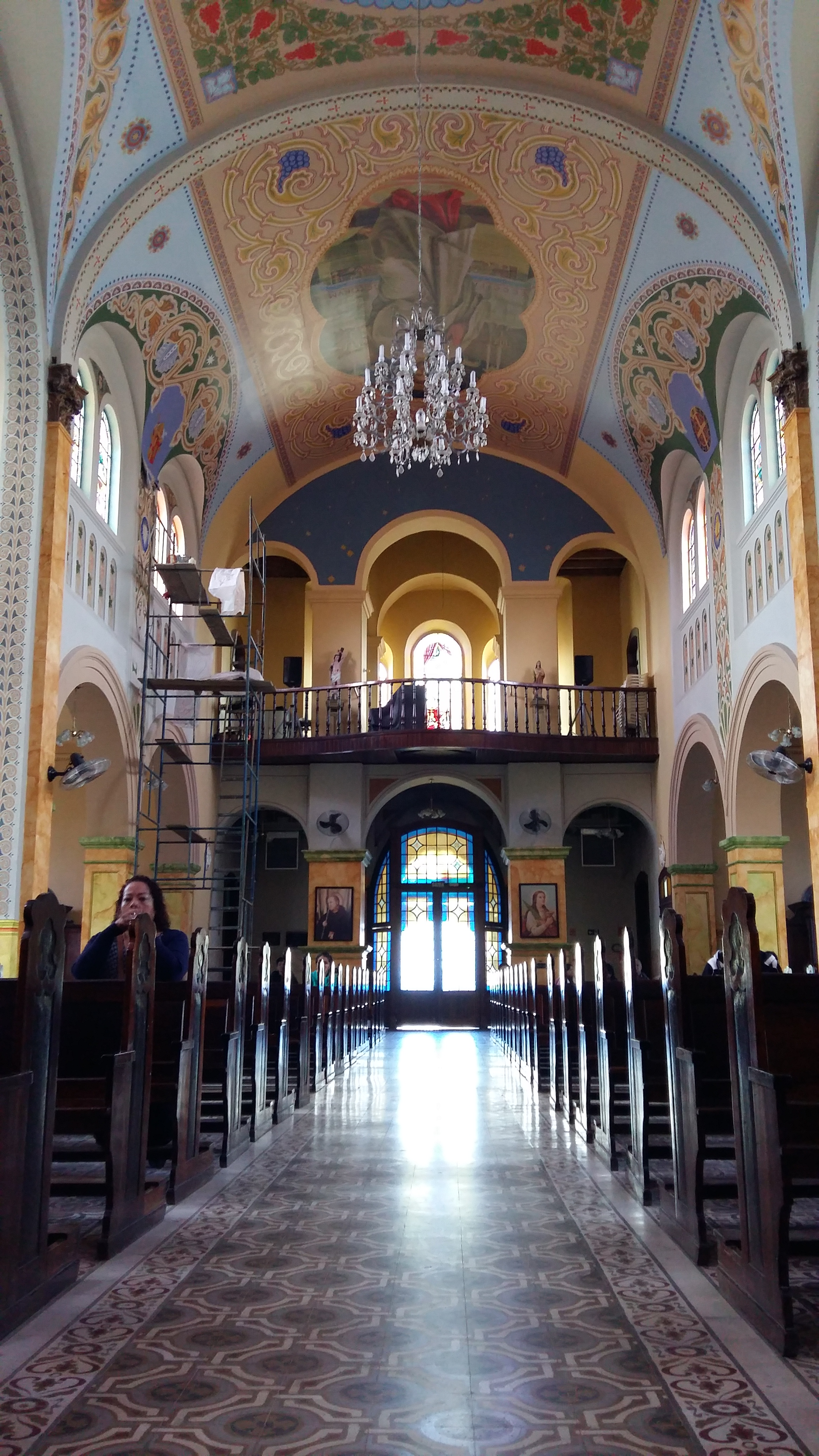 Corredor principal da Catedral, que liga o altar à saída, em São Paulo (SP), Brasil.